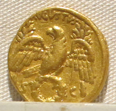 Palazzo Massimo alle Terme